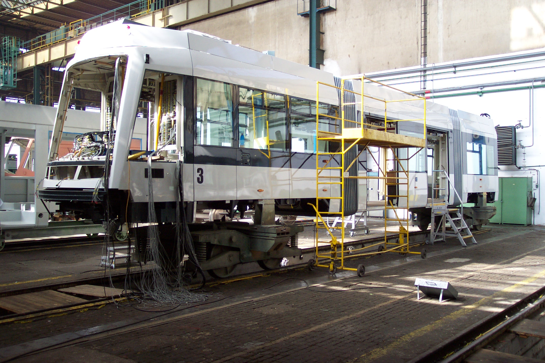 Plzeň, the unfinished tram in Škoda factory - Plzeň, nedokončená tramvaj vyráběná v továrně společnosti Škoda